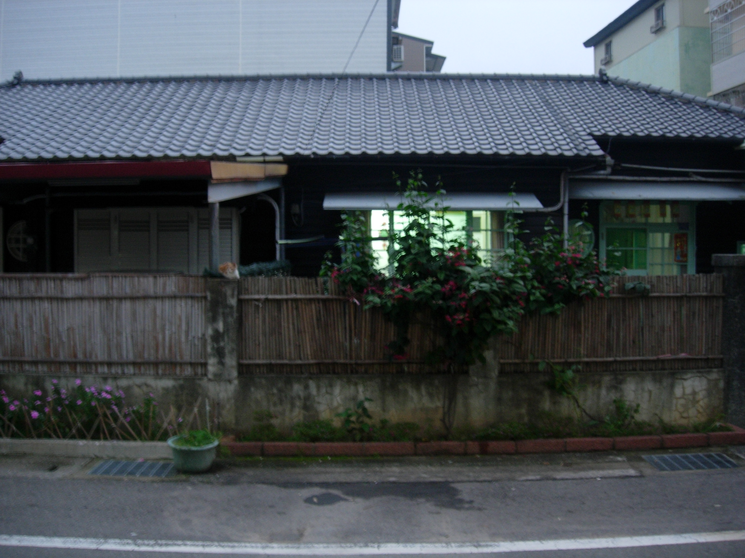 中文（台灣）: 大湖古樸住宅